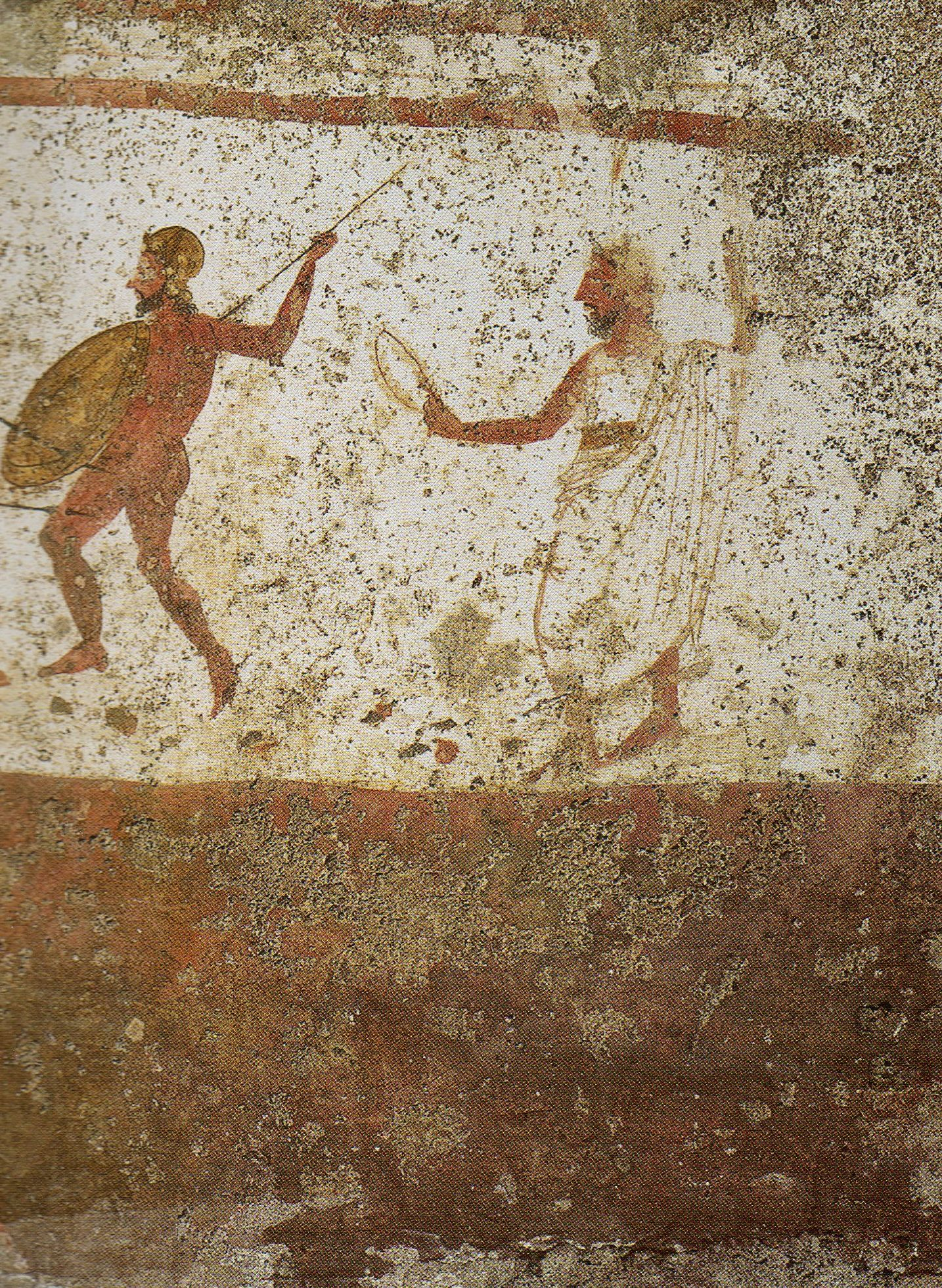 Paestum, Grab der Nereide. Detail